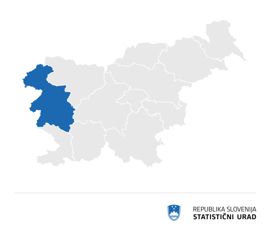 regija